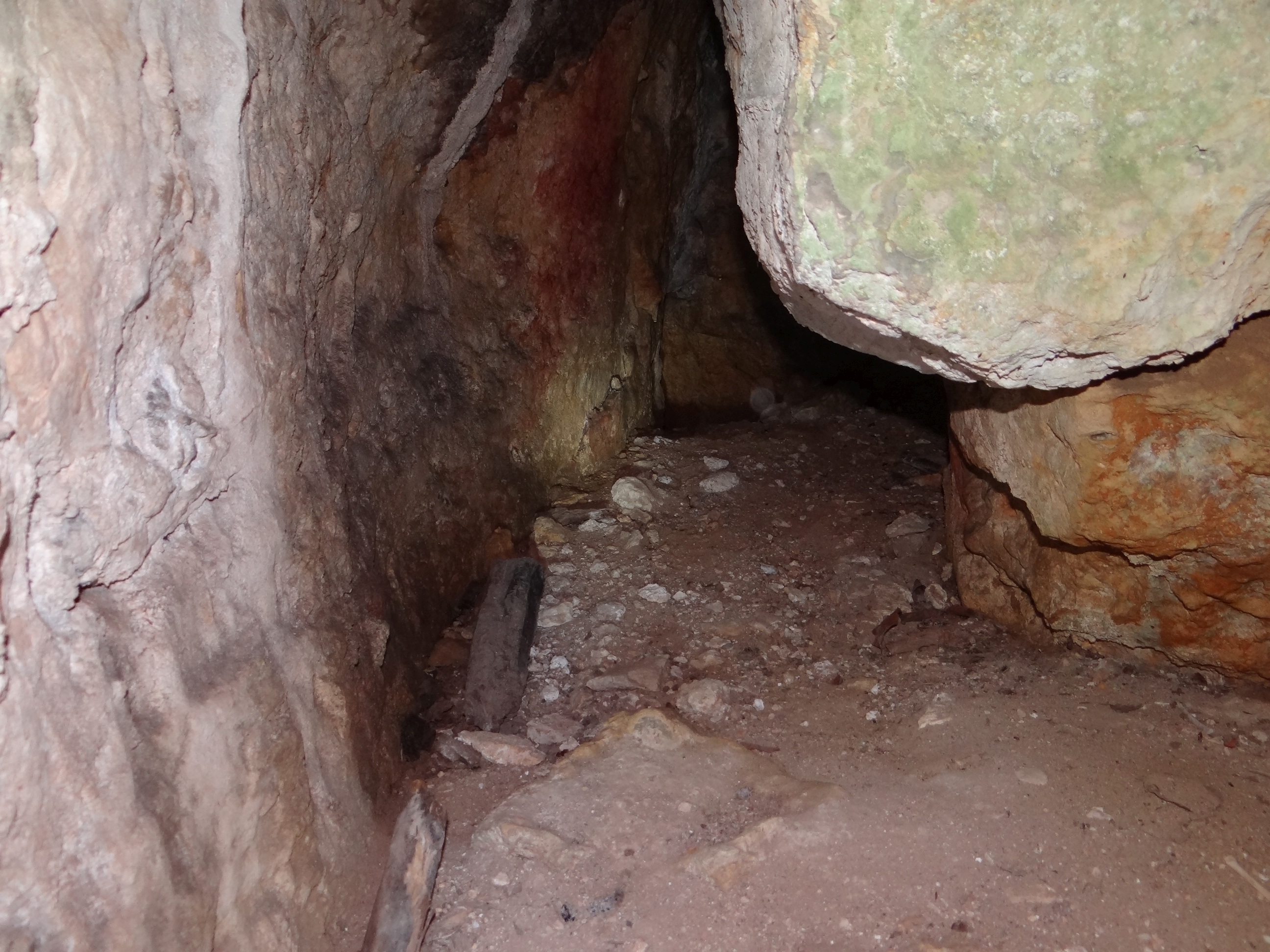 Szczelina w Popielowej Górze